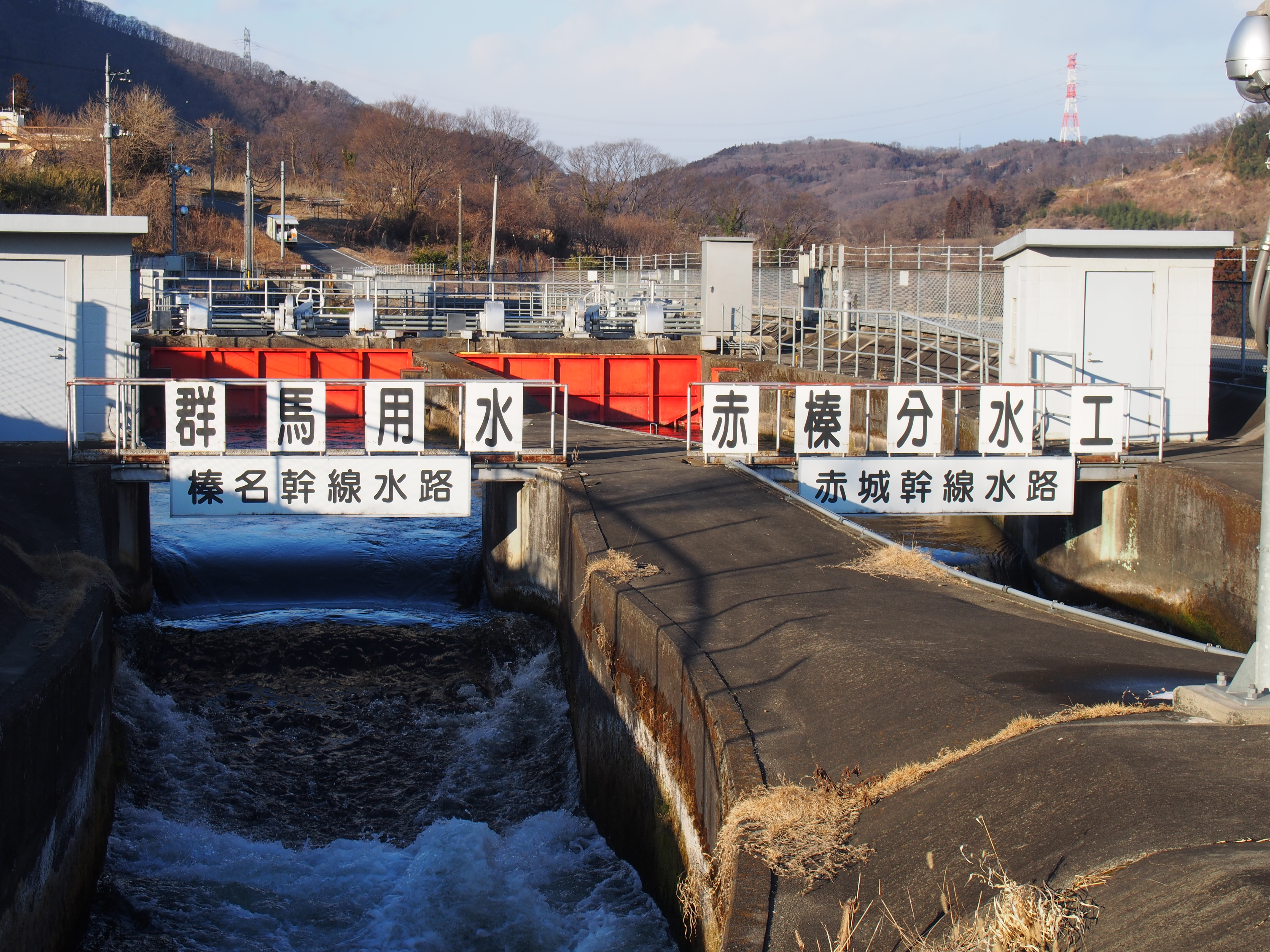 群馬用水赤榛分水工